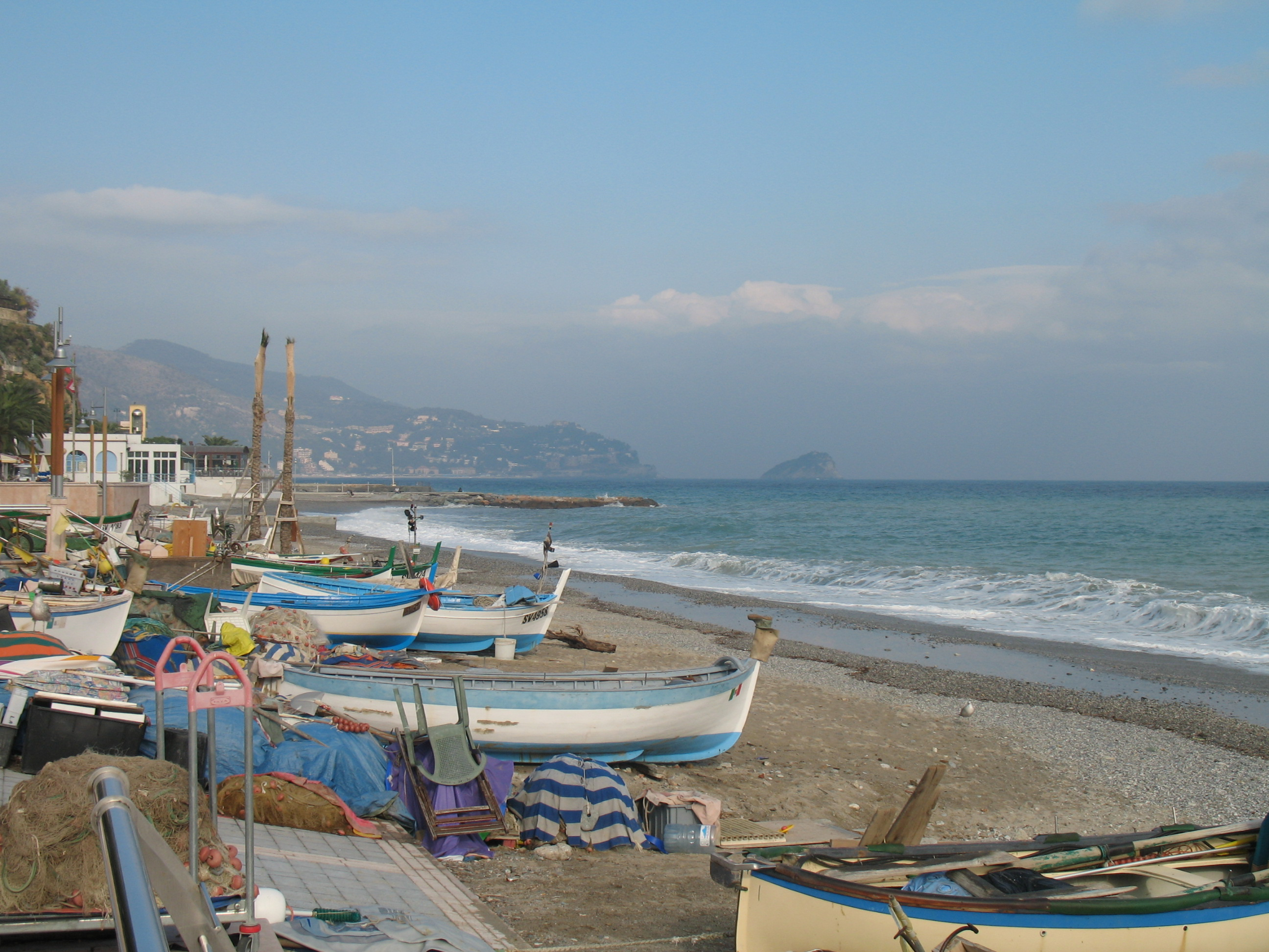 Serie di Immagini da Noli in provincia di Savona